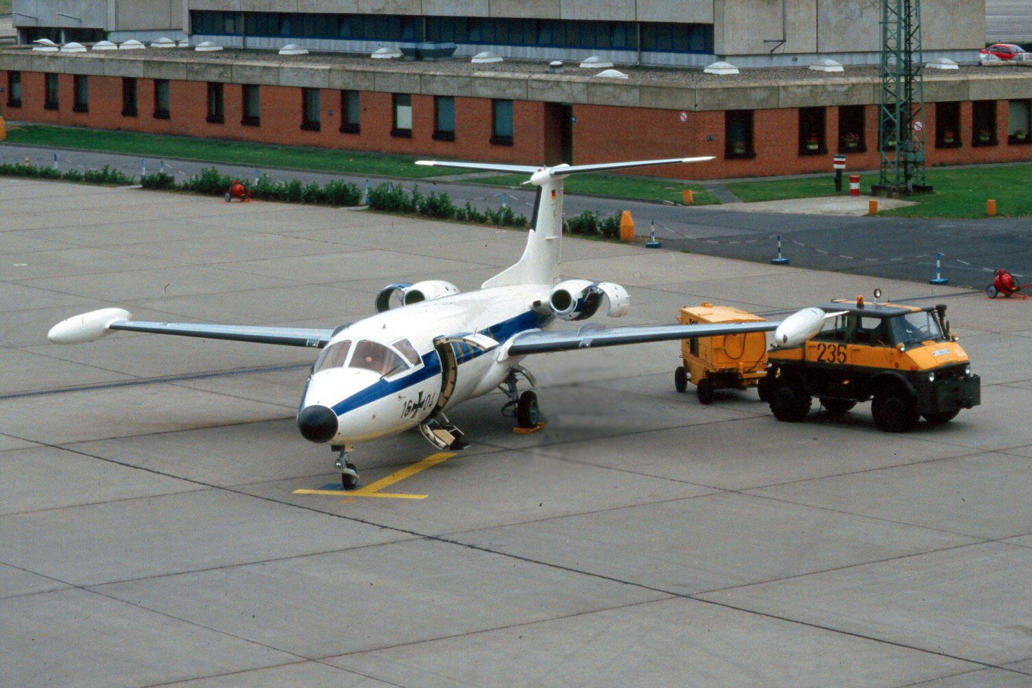 HFB 320 Hansa Jet, German Airforce VIP Aircraft